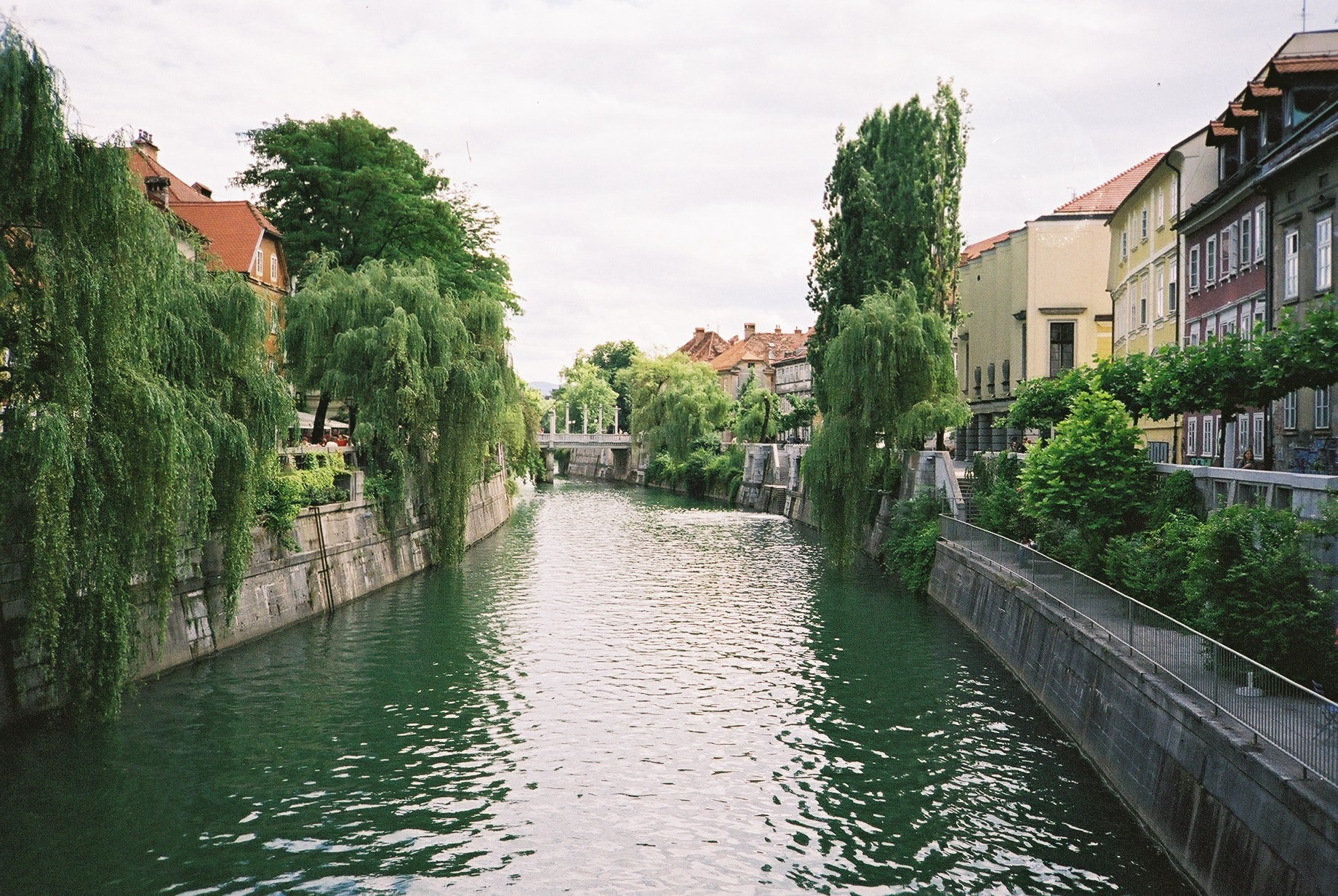 речка Любляница